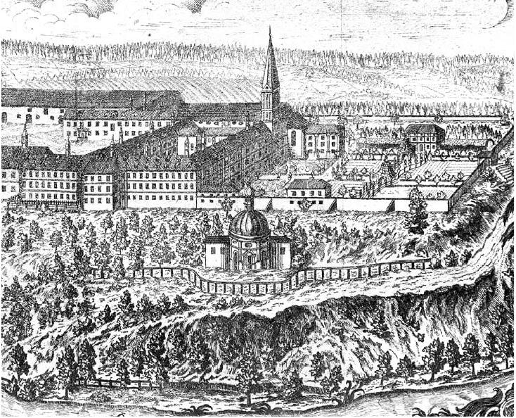 Kloster Weihenstephan mit der von den beiden Brüdern Asam 1718 bis 1720 errichteten Kapelle St. Korbinian am Südhang. Kupferstich von J. A. Zimmermann, 1767, Ausschnitt